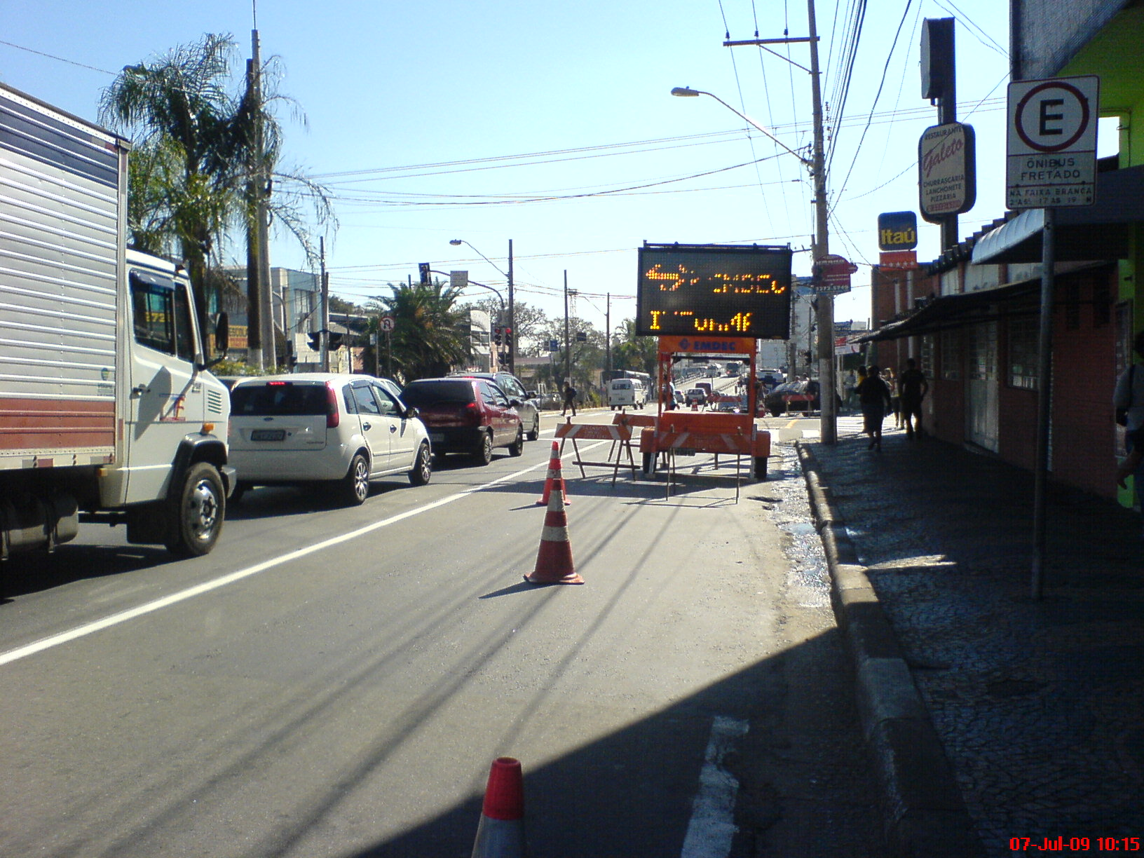 Sinalizaçao Eletrônia da EMDEC - Av Joao Jorge